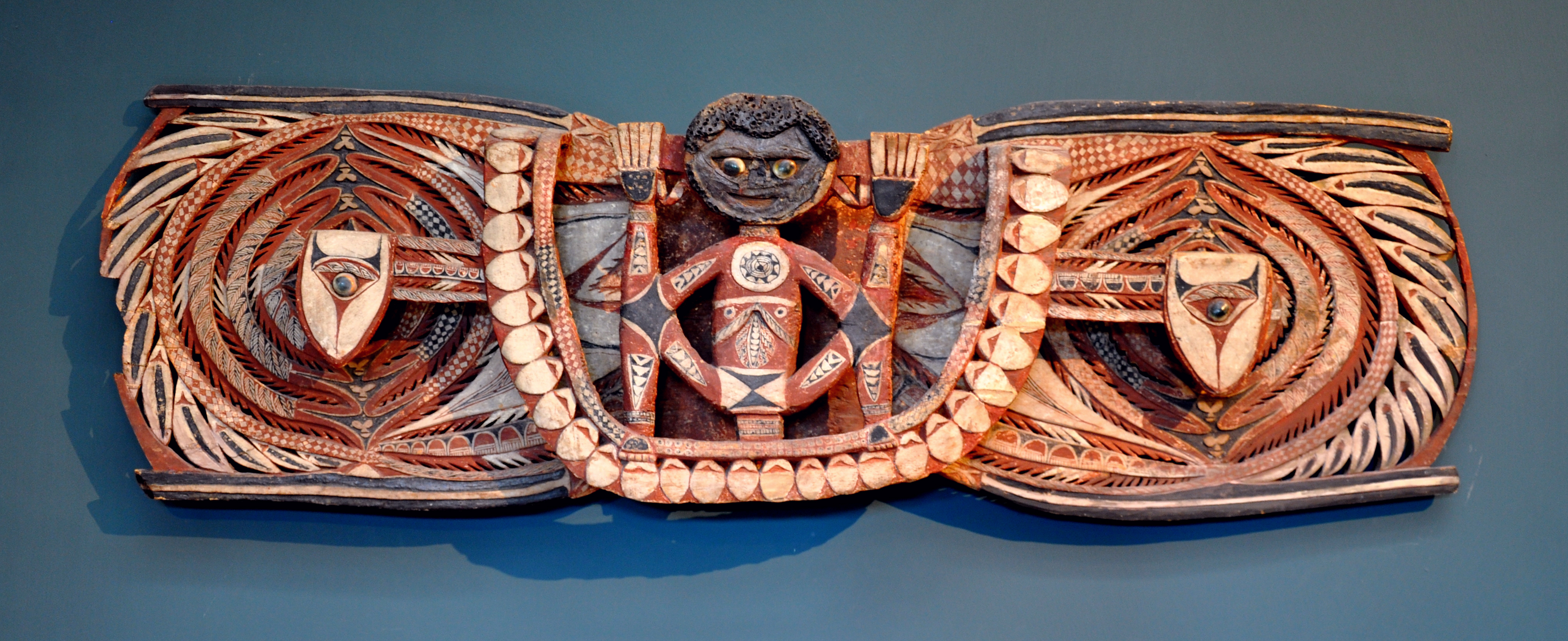 Malanggan-Fries, Papua-Neuguinea, nordwestliche Provinz Nordirland, Südküste, 19. Jh./frühes 20. Jh.; Holz, bemalt Museum Rietberg, Zürich; Geschenk Eduard von der Heydt, Inv. Nr. RME 441